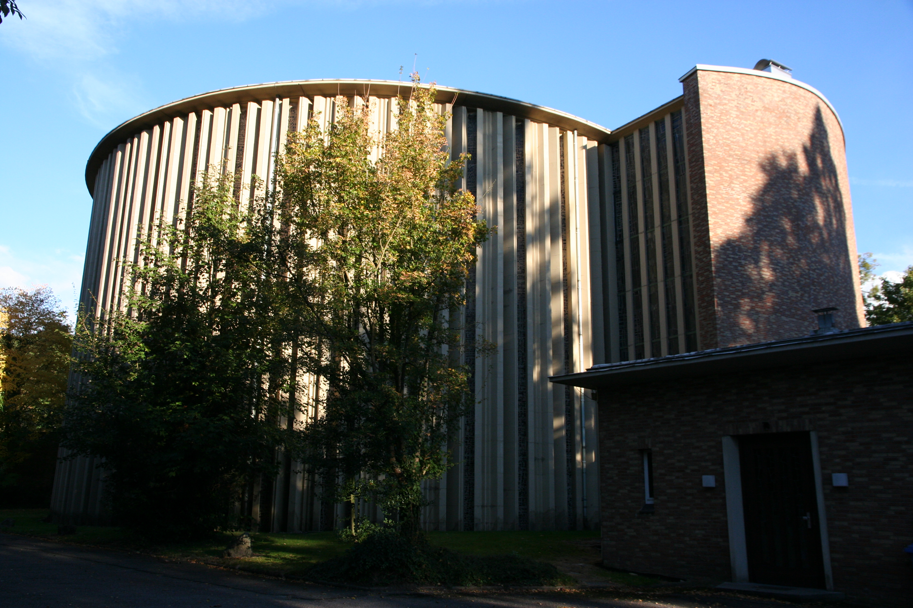 Römisch-katholische Pfarrkirche St. Josef Baden-Baden